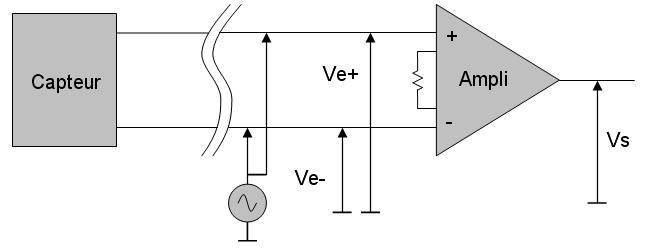 Schéma électrique - illustration du mode commun - je suis l'auteur